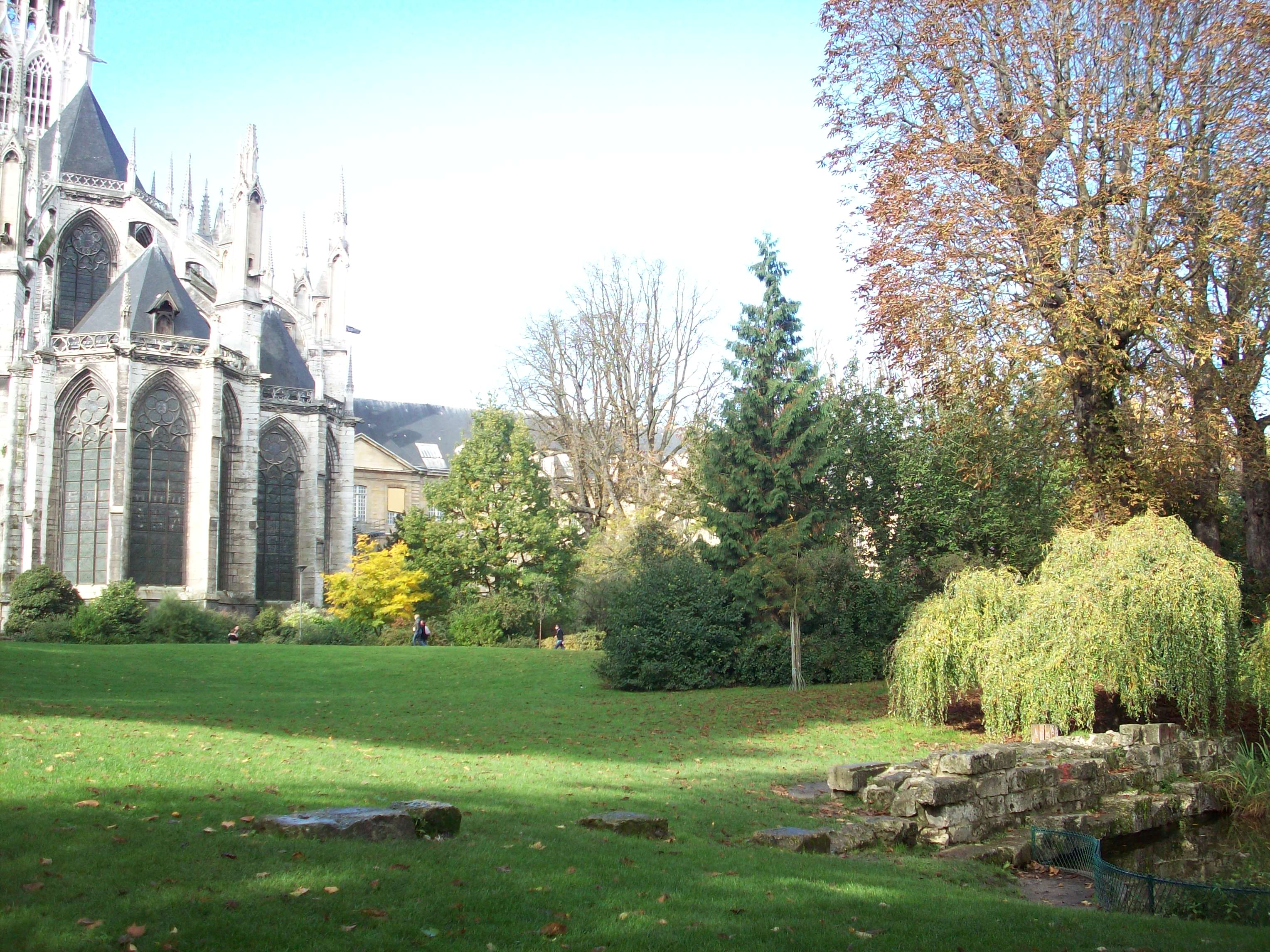 Jardin de l'hôtel de ville. On aperçoit la base du mur d'enceinte du jardin de l'abbaye.